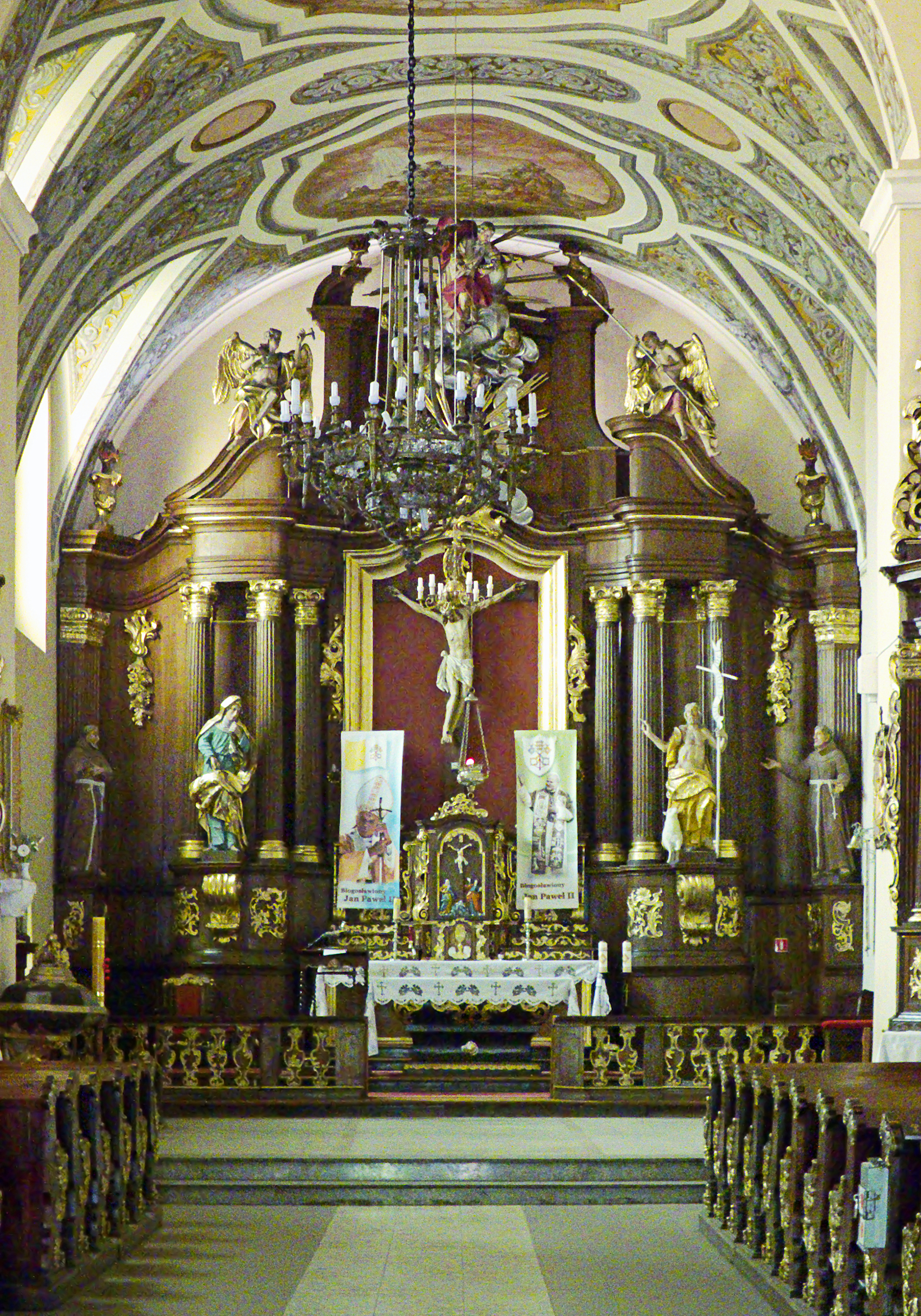 Szamotuły, nawa kościoła Świętego Krzyża